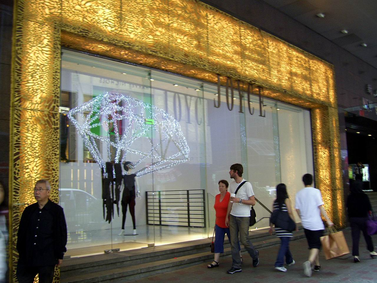 Joyce Boutique 新世界大廈旗艦店